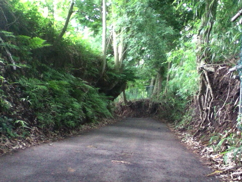 横浜市旭区今宿南町の山林